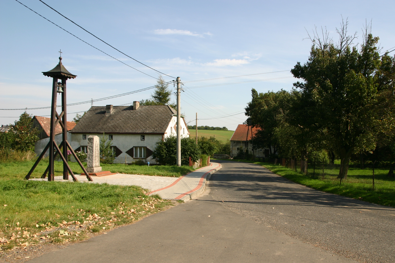 Laskowiec wieś w Polsce położona w województwie opolskim, w powiecie prudnickim, w gminie Biała.